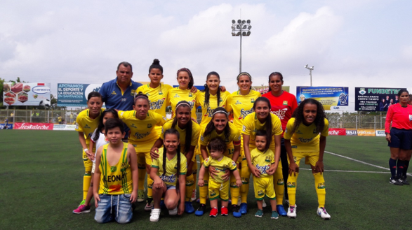 Atlético Bucarmanga en su primera participación de la Liga Femenina Águila.